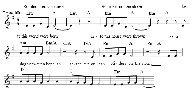 Chord progression and Melody of the Doors-Title Riders in the Storm